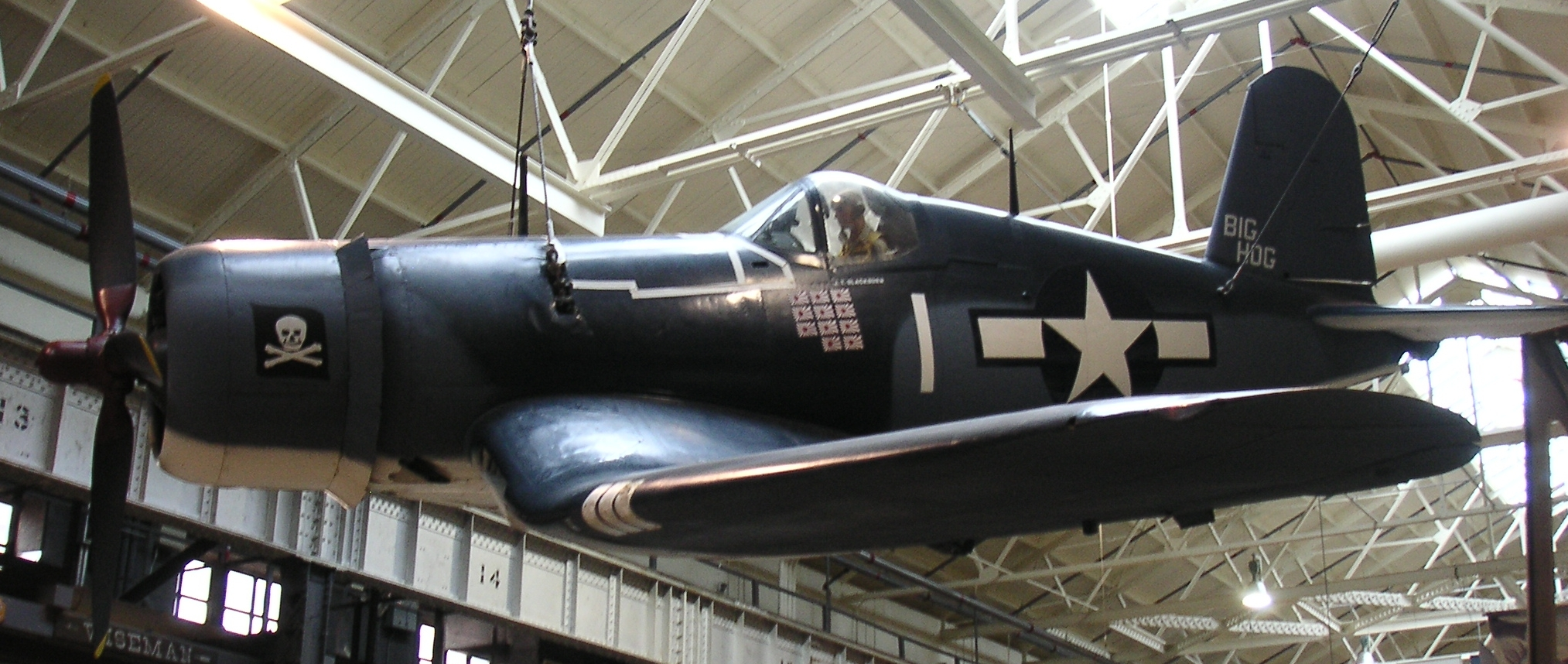 FG-1D von Goodyear gefertigte F4U-1 im U.S. Navy Museum, Washington D.C.